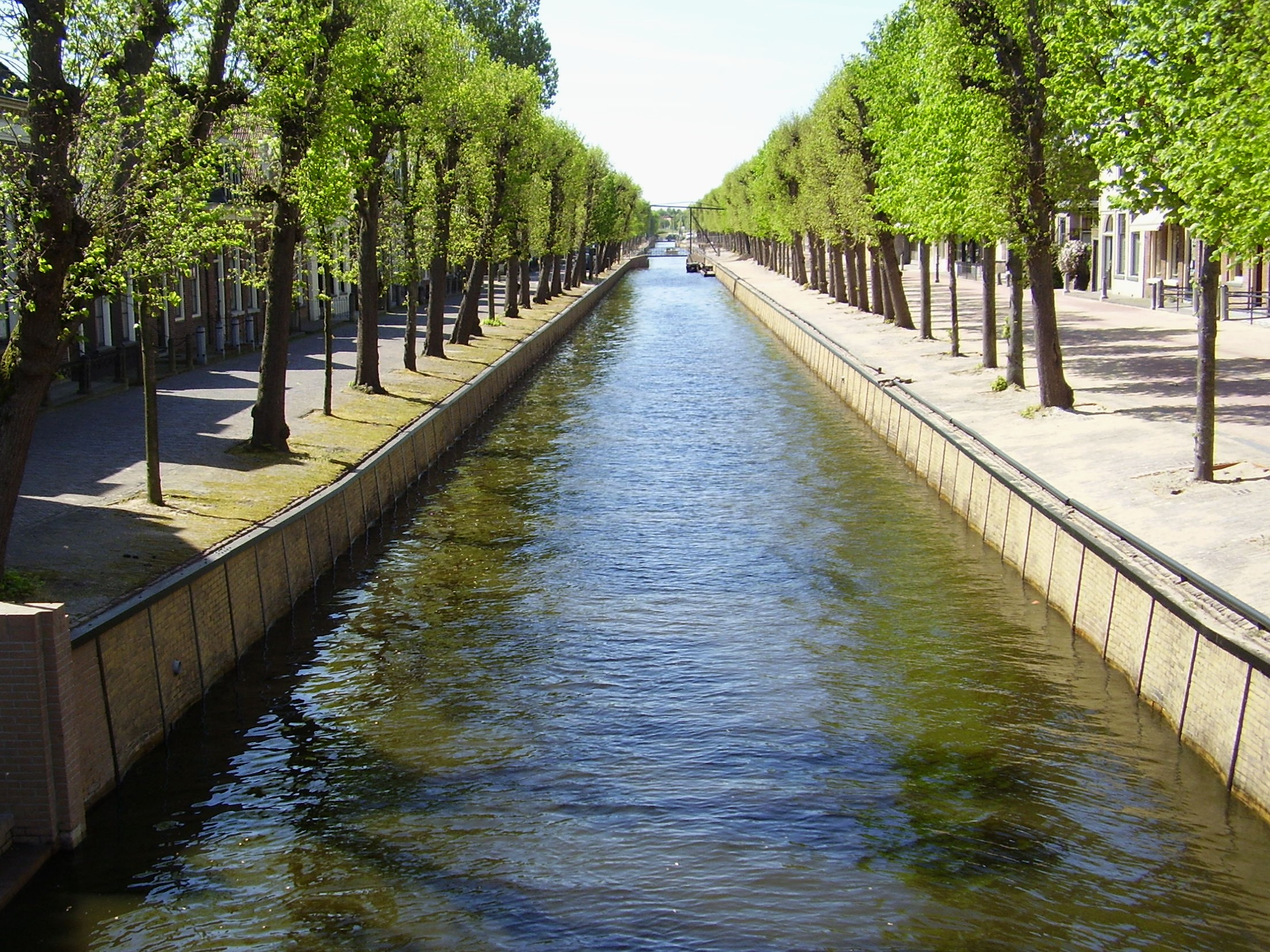 De Luts in Balk in gemeente Gaasterlân-Sleat, provincie Friesland